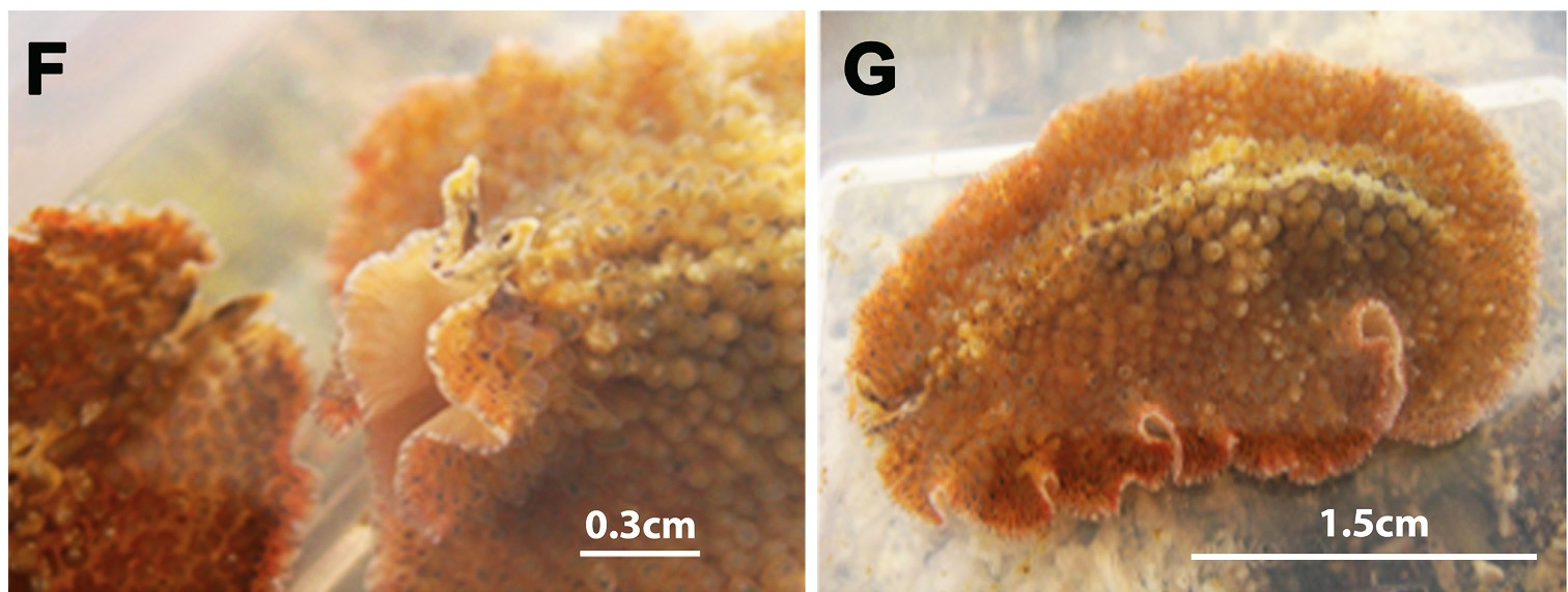 Thysanozoon brocchii, recolectado en la Ría de Arosa, Galicia, España. F: vista de ojos frontales. G: vista dorsal del animal. Noreña C, Marquina D, Perez J, Almon B (2014) First records of Cotylea (Polycladida, Platyhelminthes) for the Atlantic coast of the Iberian Peninsula. ZooKeys 404: 1-22.